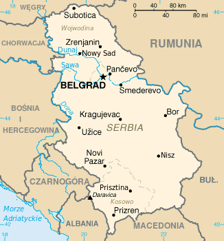 Mapa Serbii na potstawie CIA WorldFactBook